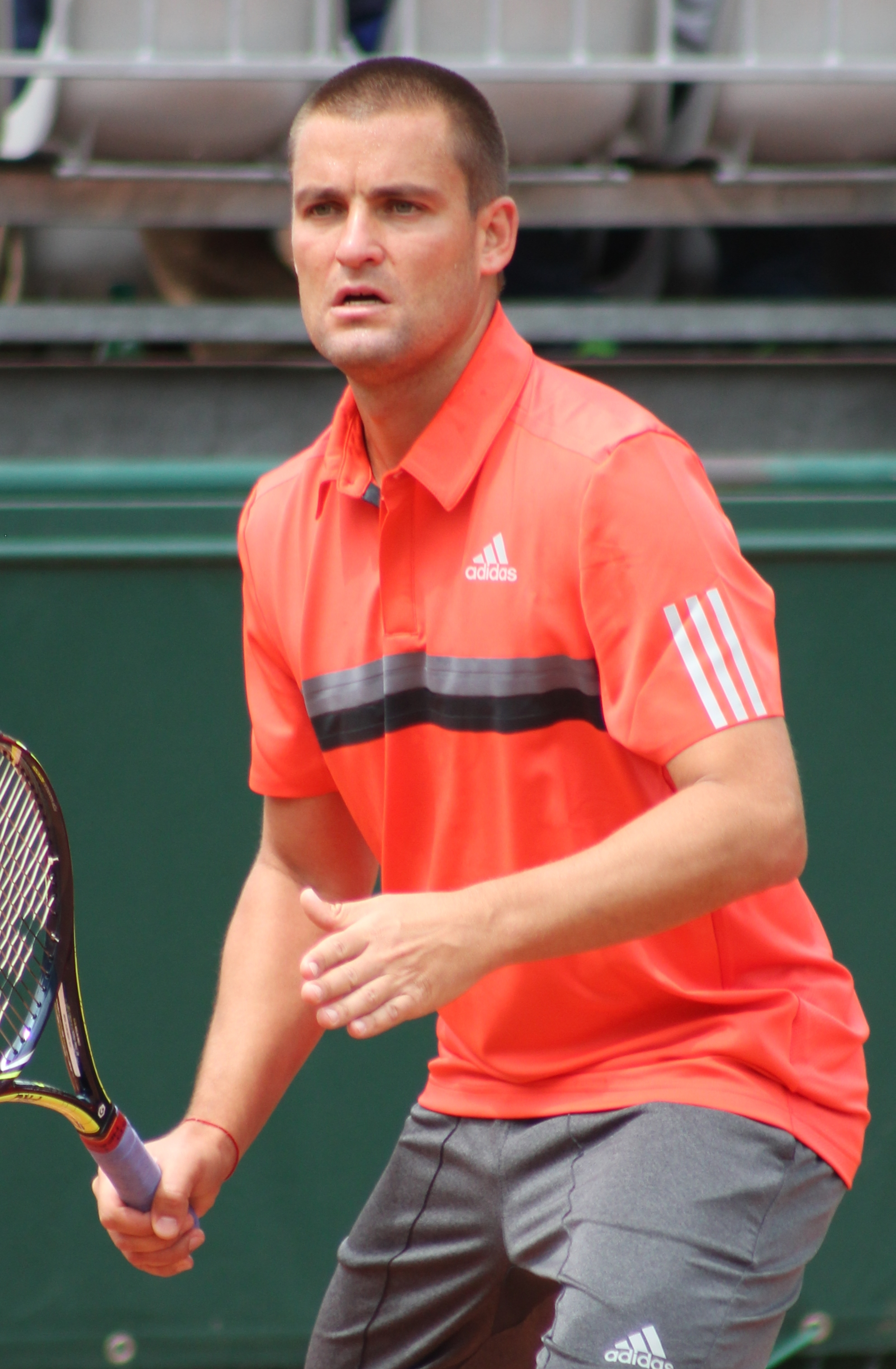 Youzhny RG15 (11)